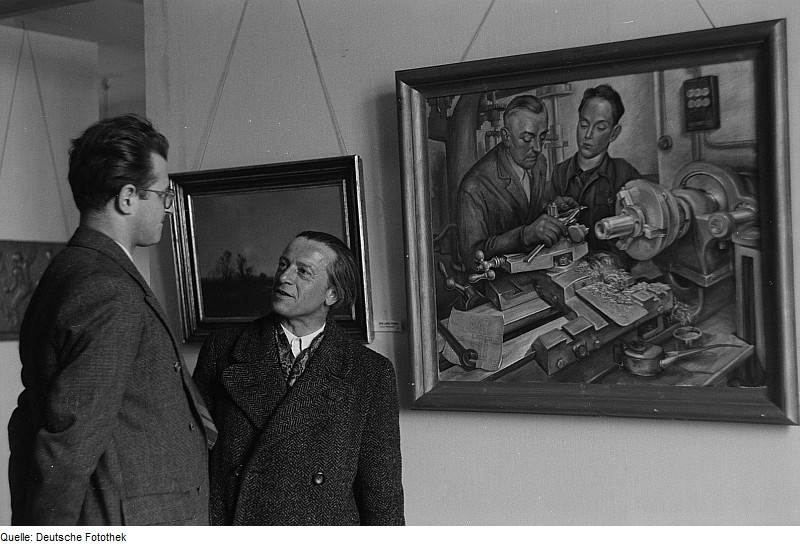 Original image description from the Deutsche Fotothek Portrait Horst Schlossars und eines weiteren Mannes vor Gemälden